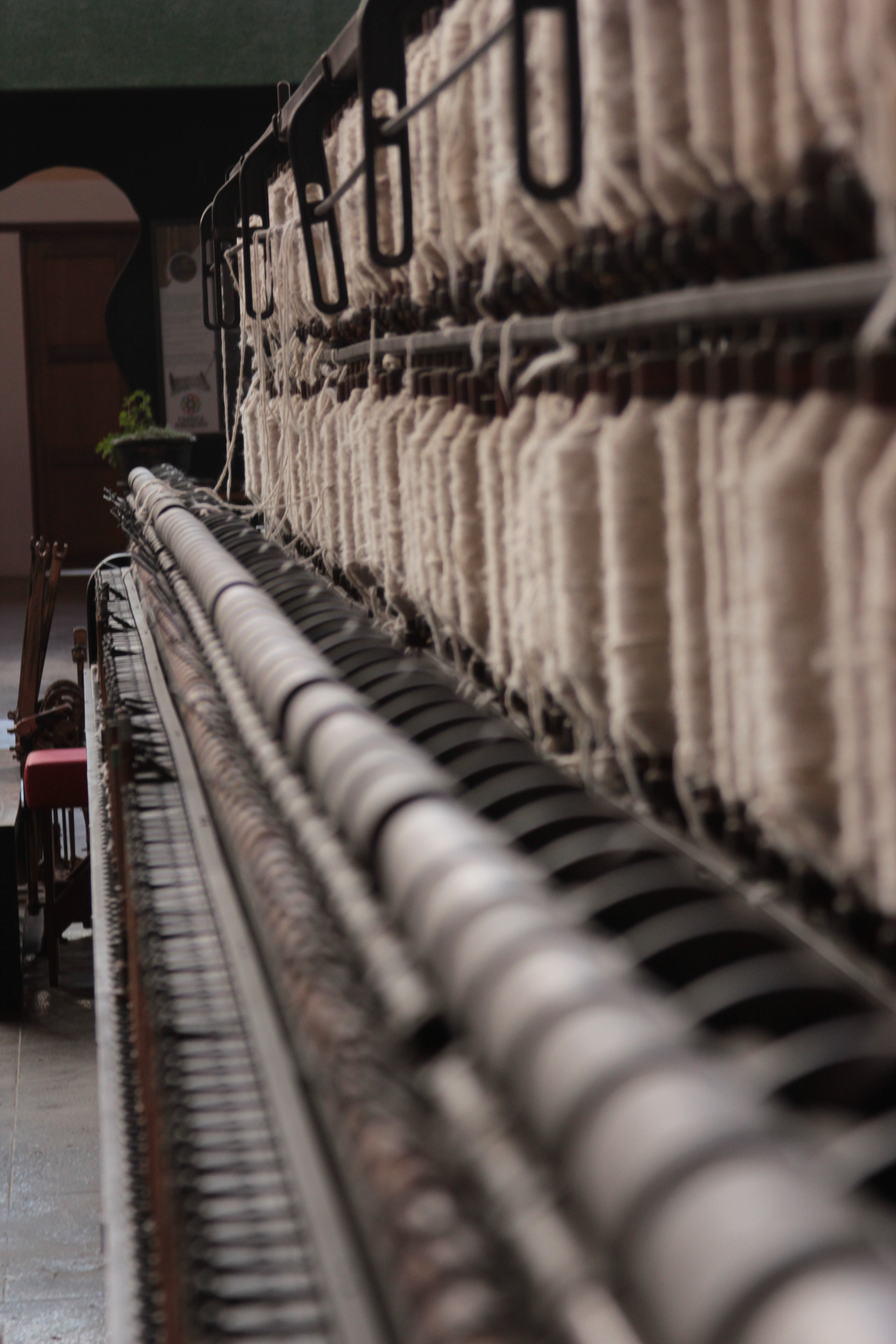 Fabrica_Imbabura (9)